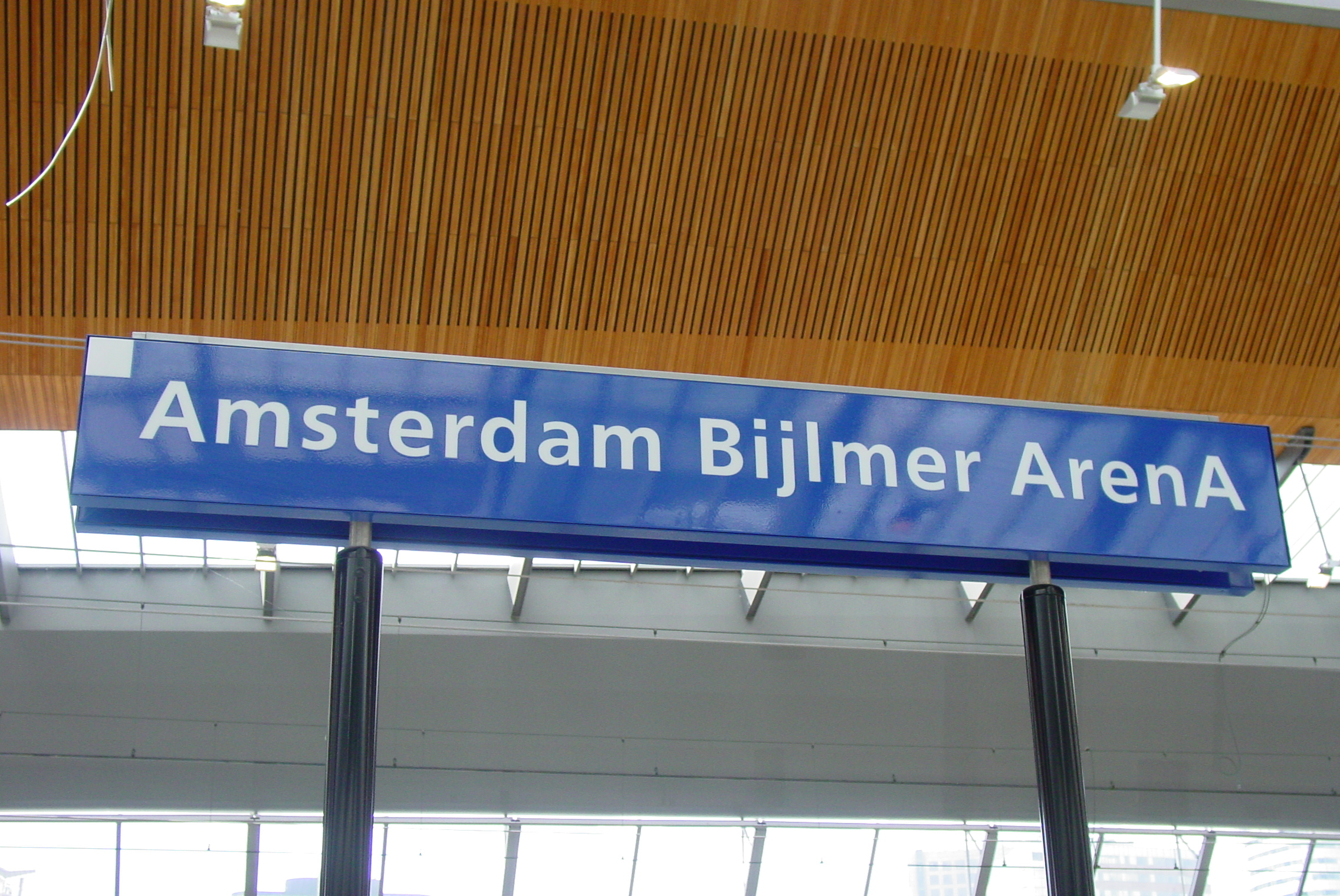 Het stationsbord van Station Amsterdam Bijlmer ArenA in Nederland.